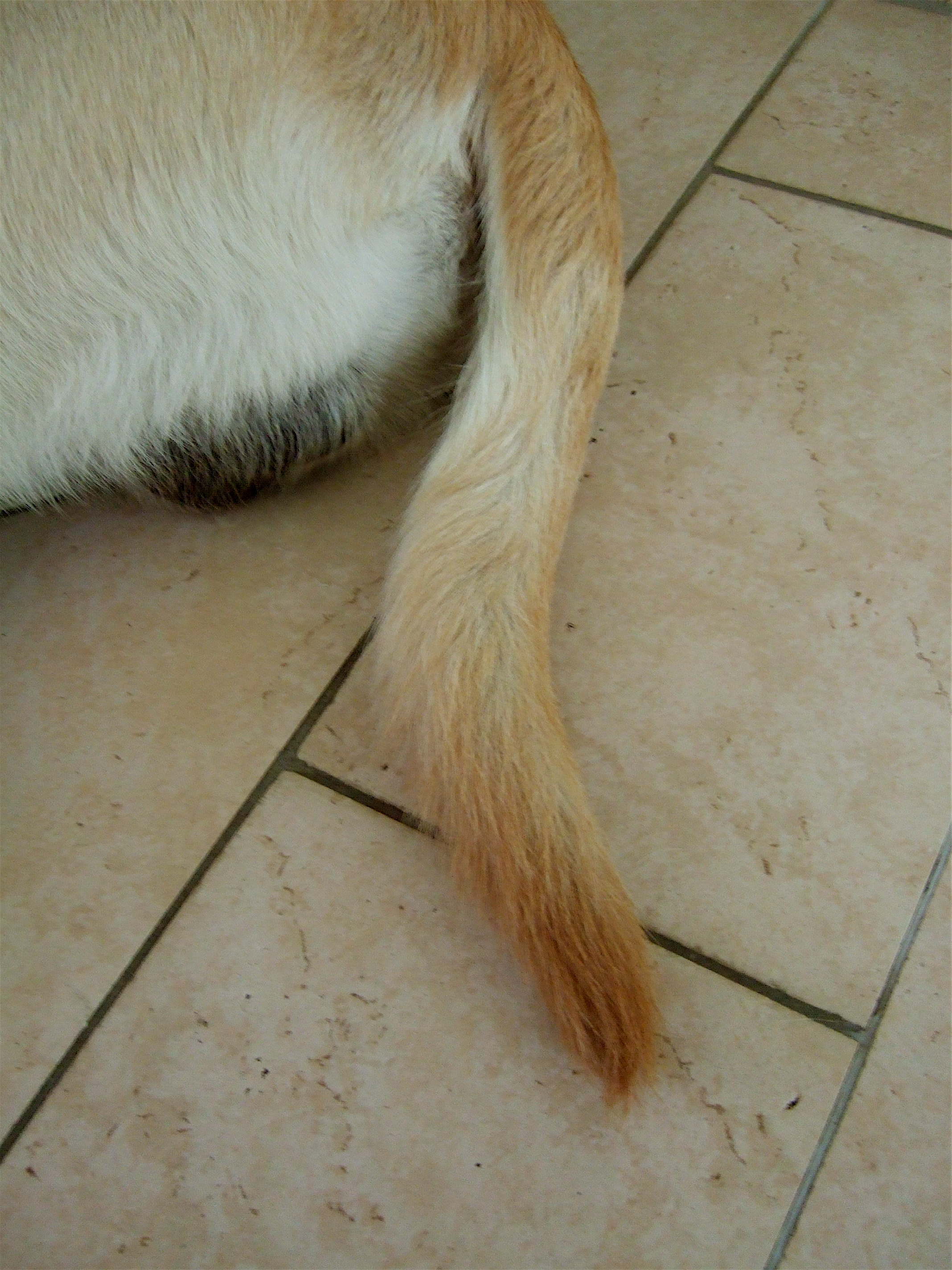 Hundeschwanz eines Labradors